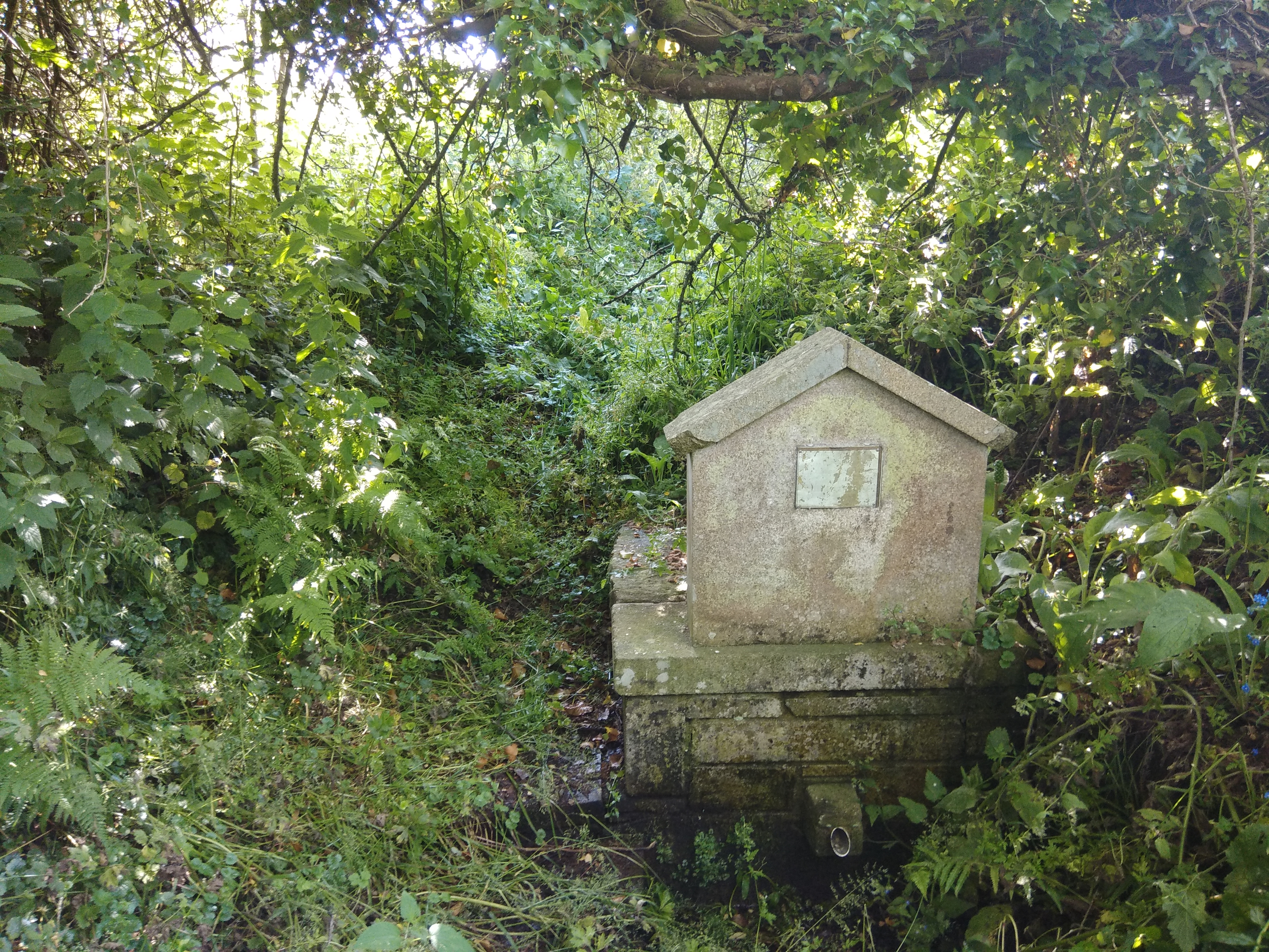 Fonte da Nosa Señora de Teixeiro, Curtis, Galiza.